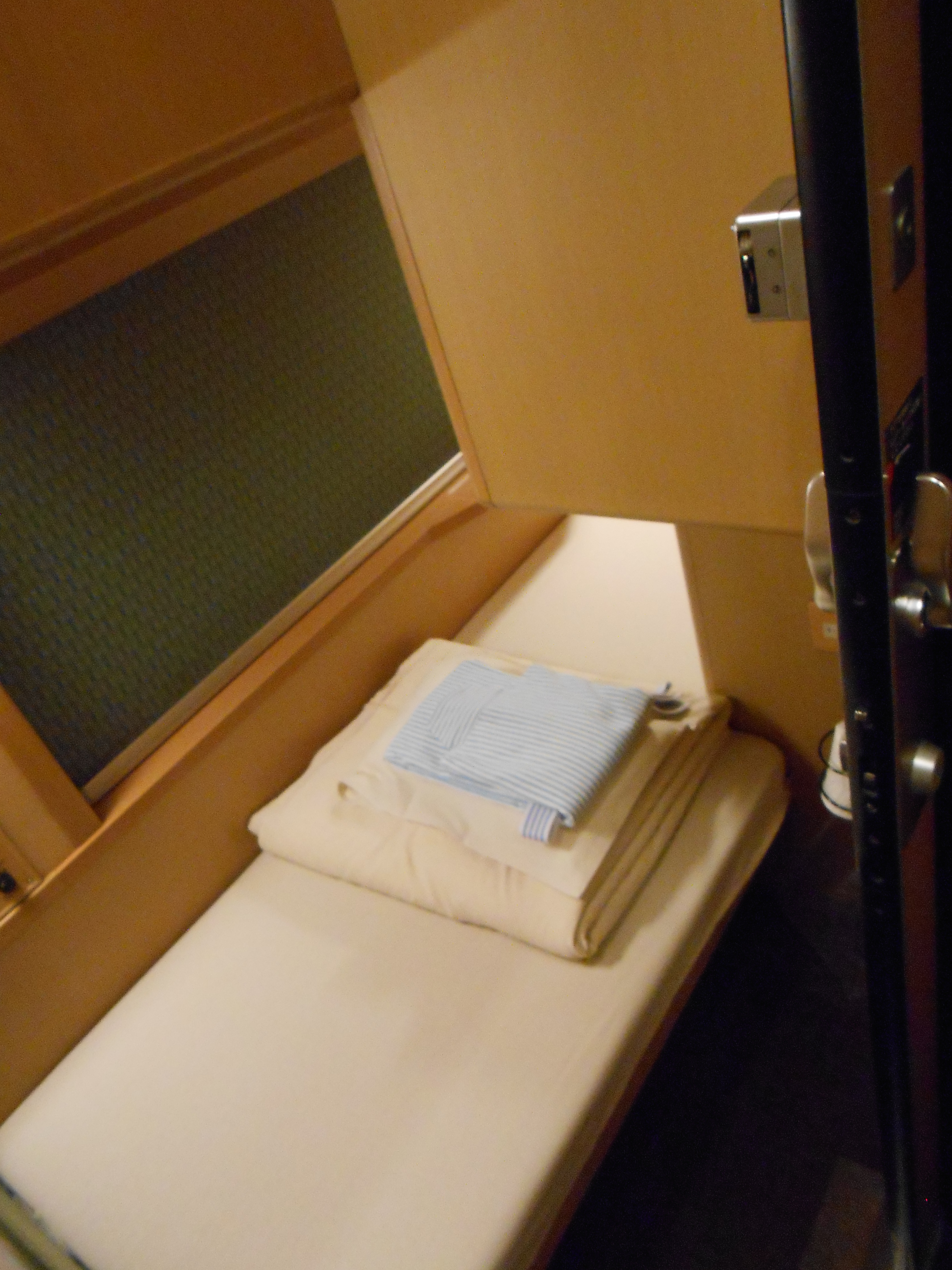 サンライズ ソロ下段